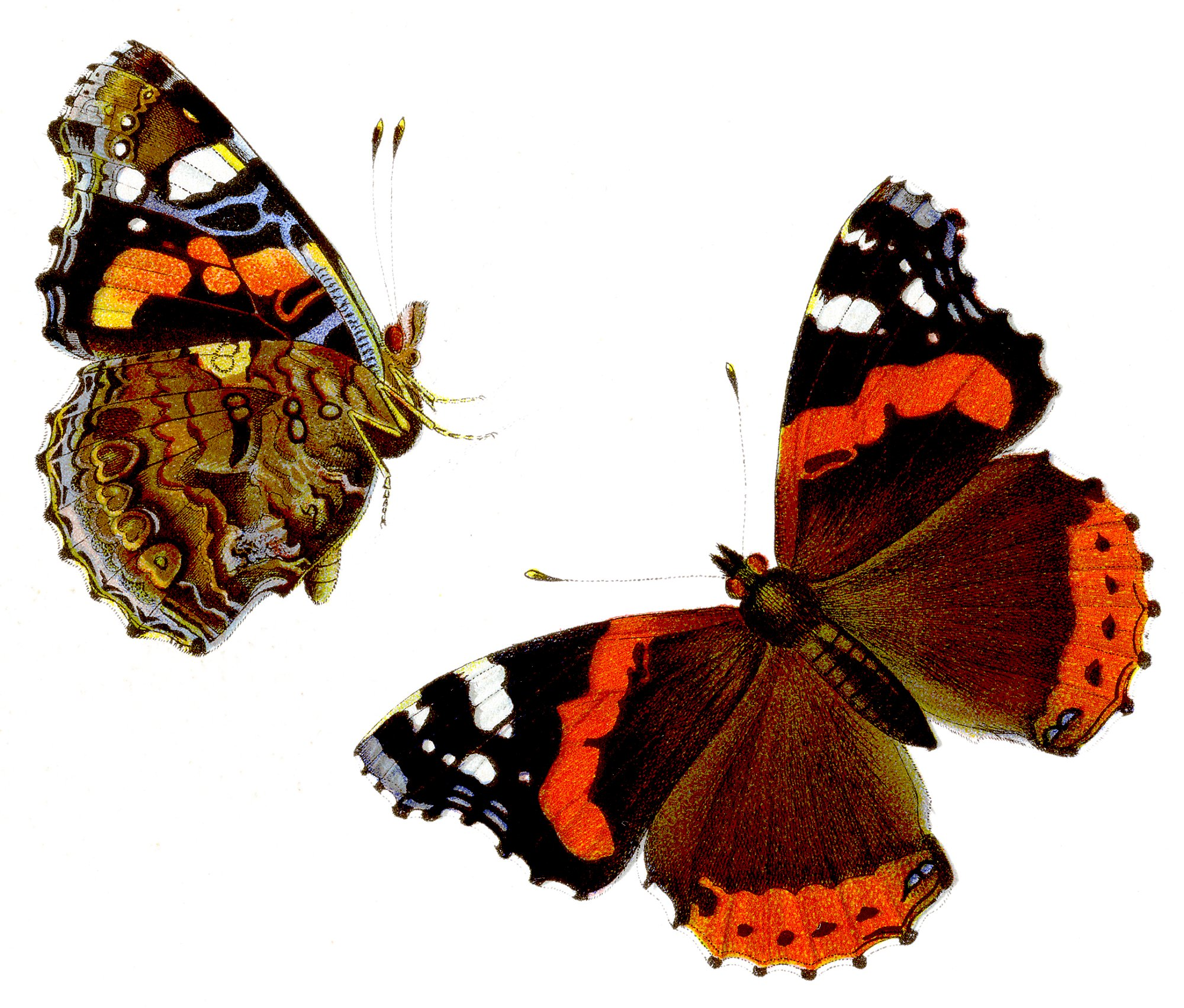 Admiral - Vanessa atalanta